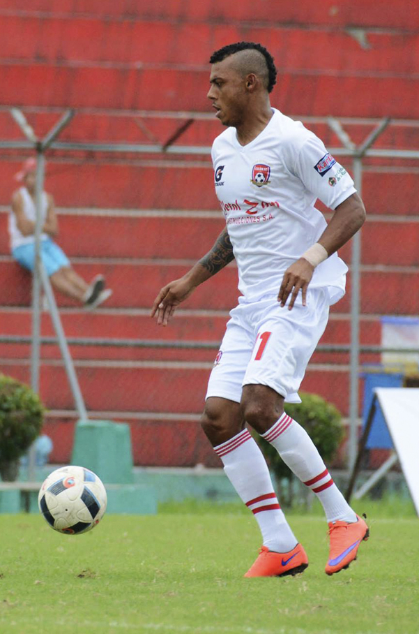 José Luis Gutiérrez jugando para el Colón FC en el 2016